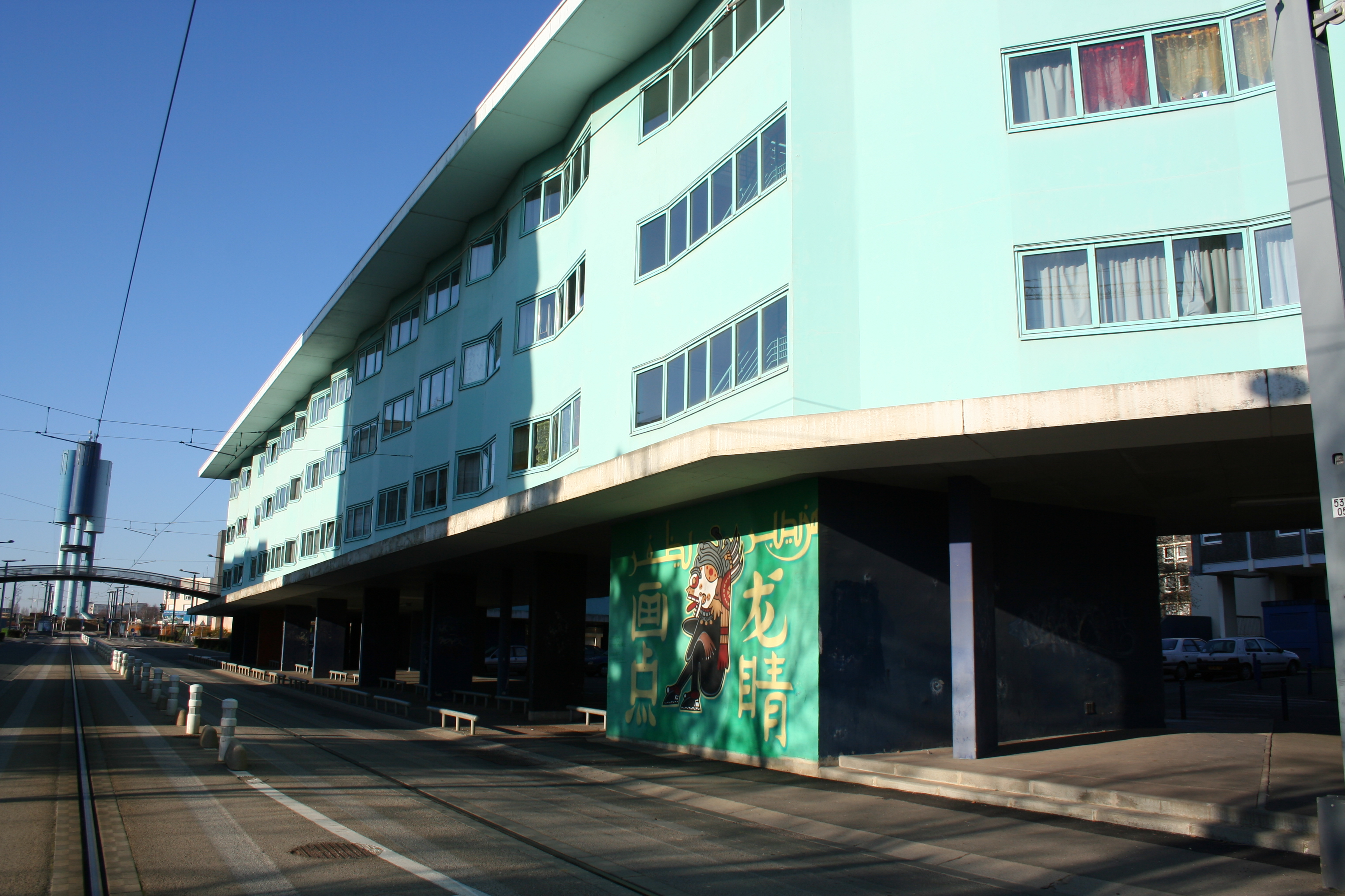 L'avenue de la grande cavée vers la place de la fontaine à partir de la cité universitaire Flora Tristan, Hérouville St Clair